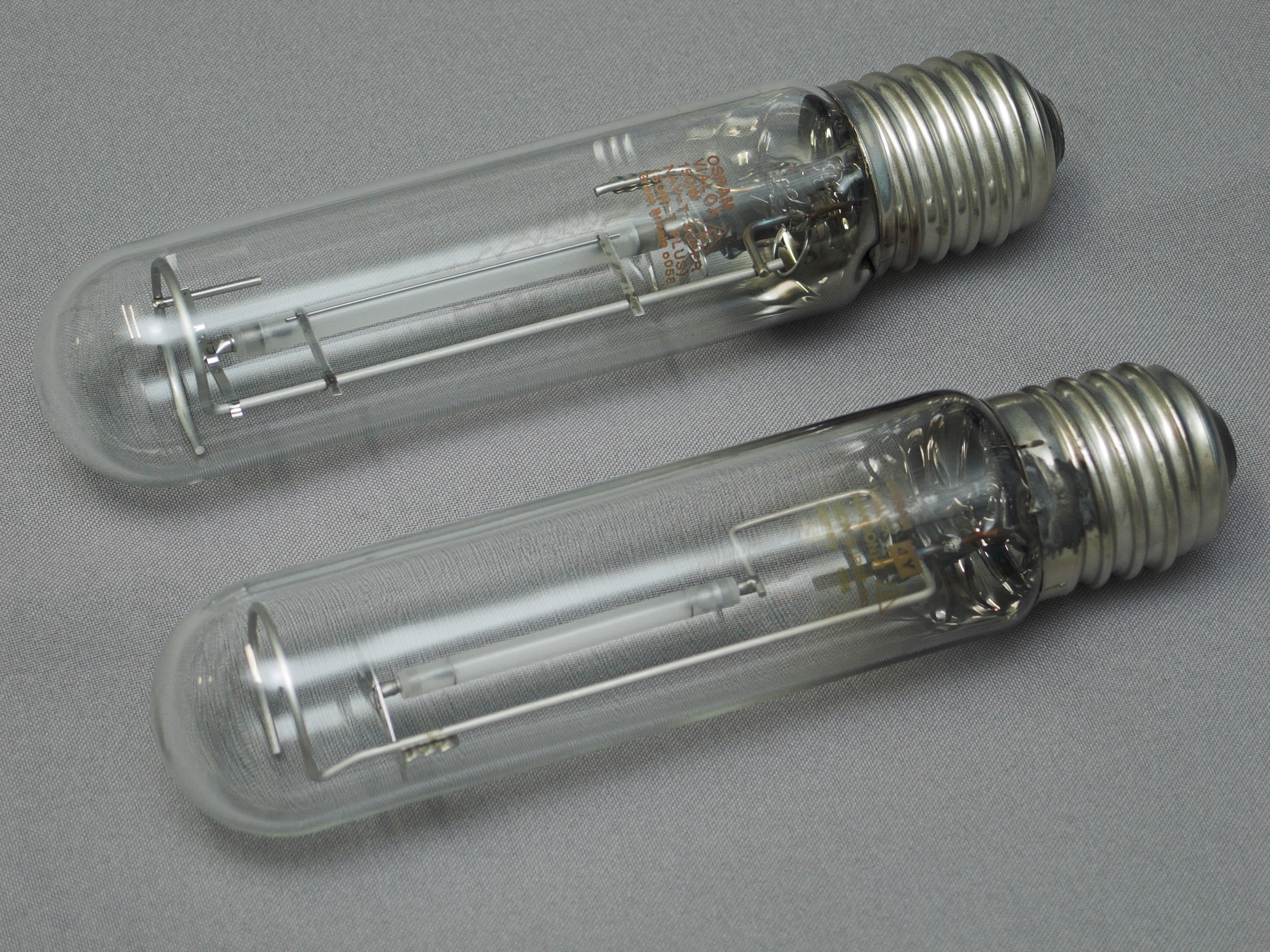 Zwei Natriumdampfhochdrucklampen mit E40 Edison-Gewinde; oben 150 Watt, unten 100 Watt